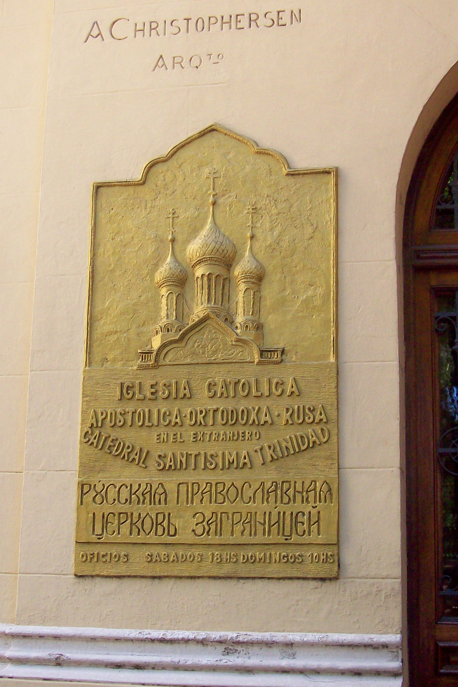 Placa recordatoria en el Templo ortodoxo ruso de la Santísima Trinidad en el Barrio de San Telmo, Buenos Aires, Argentina. Su arquitecto fue Alejandro Christophersen.